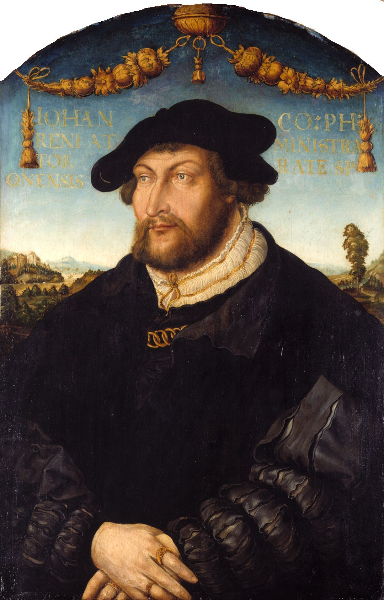 Bildnis des Pfalzgrafen Johann III.(1488-1538), Administrator des Bistums Regensburg